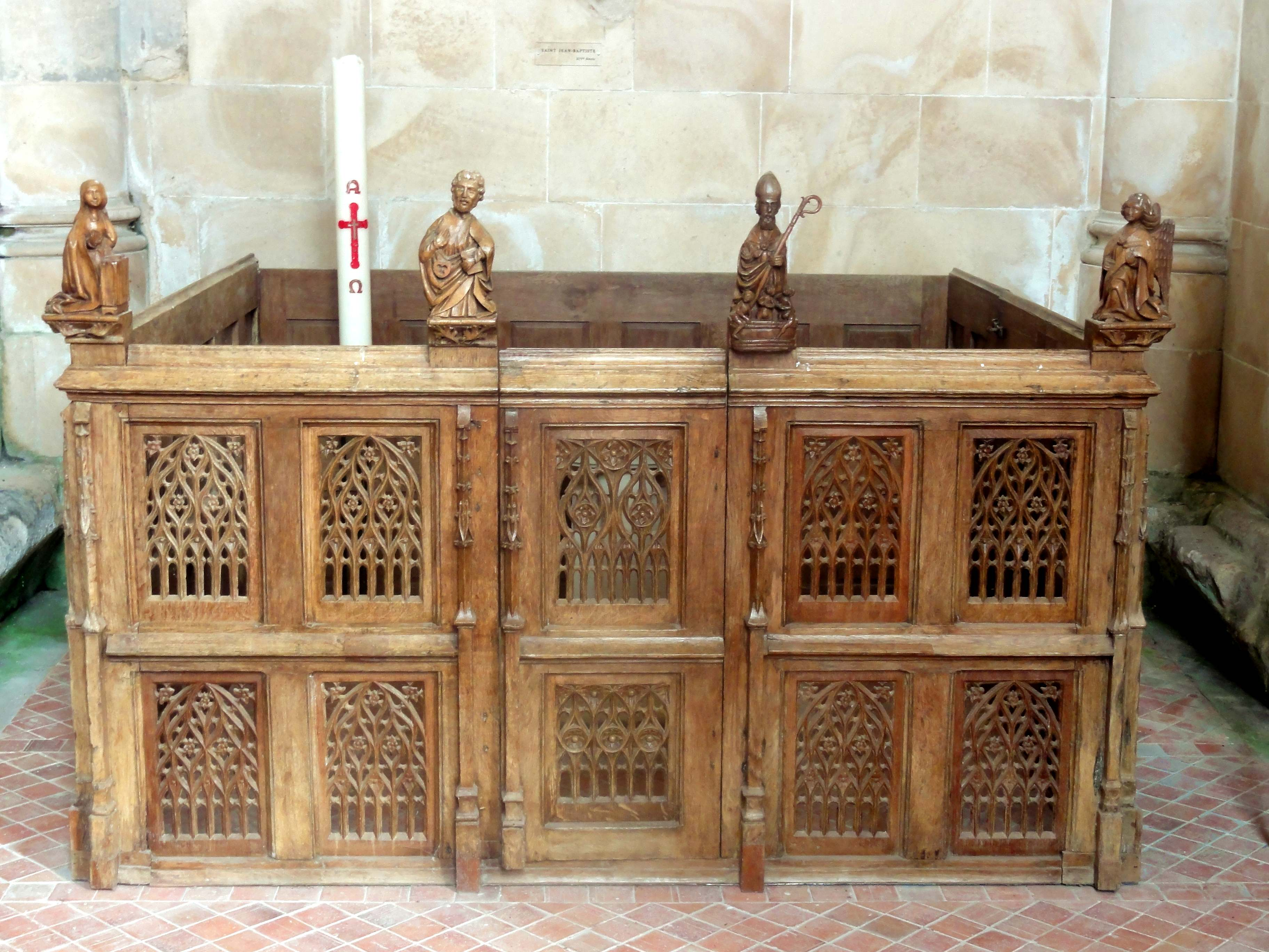 Clôture des fonts baptismaux.